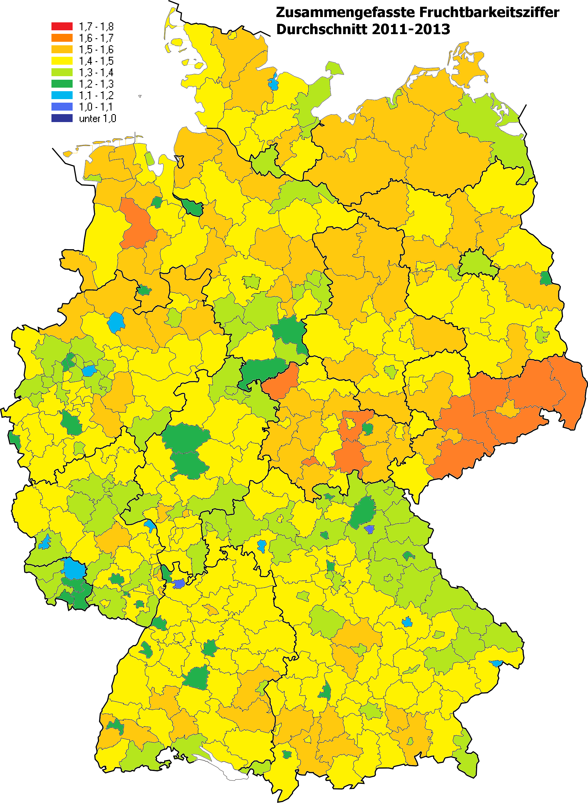 Durchschnittliche Kinderzahl in den Land- und Stadtkreisen 2009